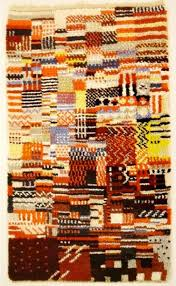 Otti bergerren lanetariko bat